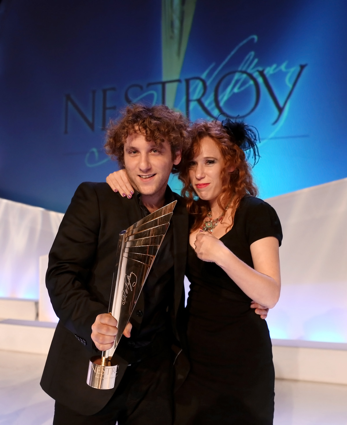 Yael und Michael Ronen - Nestroy-Theaterpreis 2013 in der Halle F der Wiener Stadthalle (Wien, Österreich).